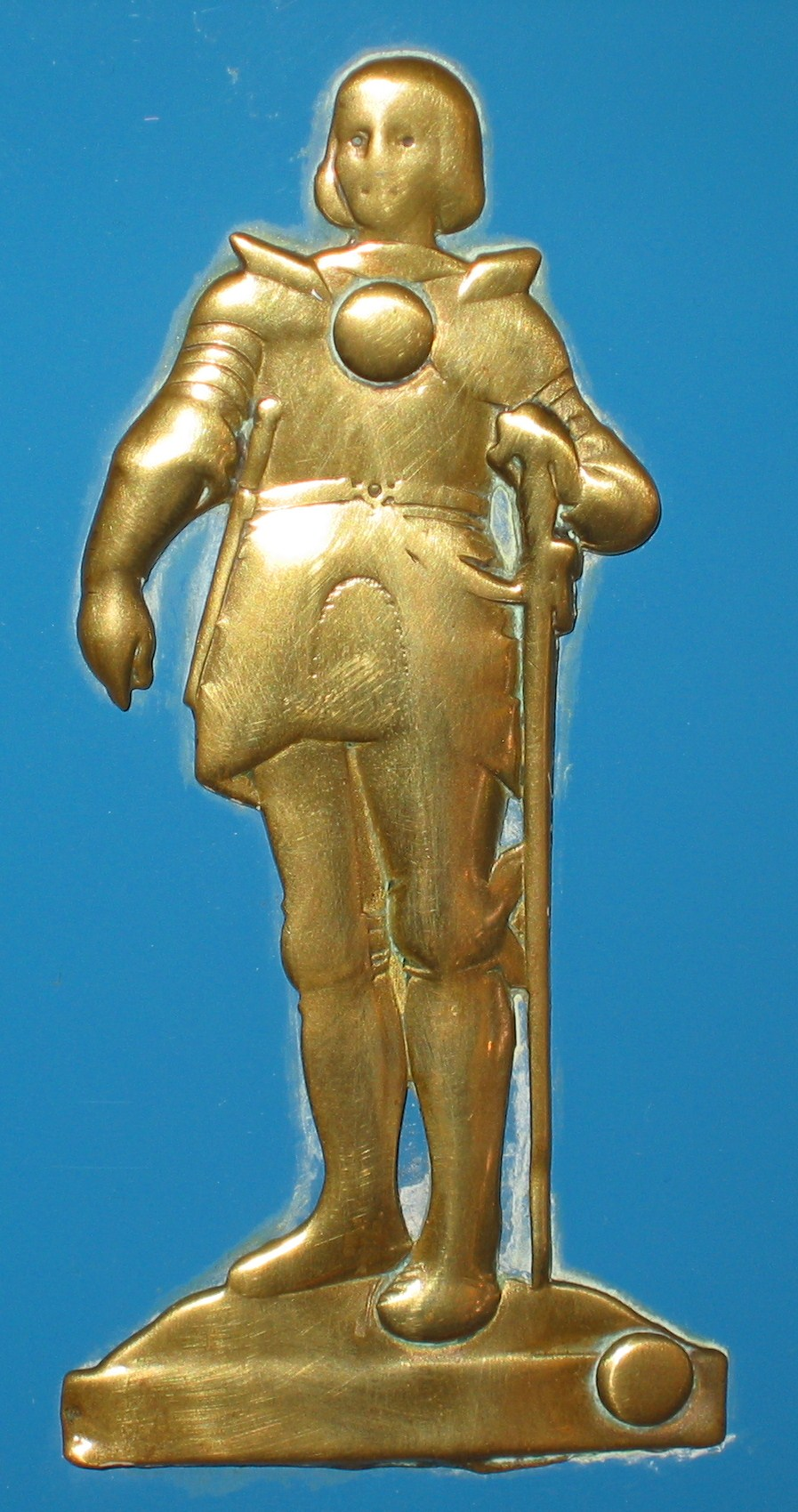 Emblem Clément-Bayard 1913